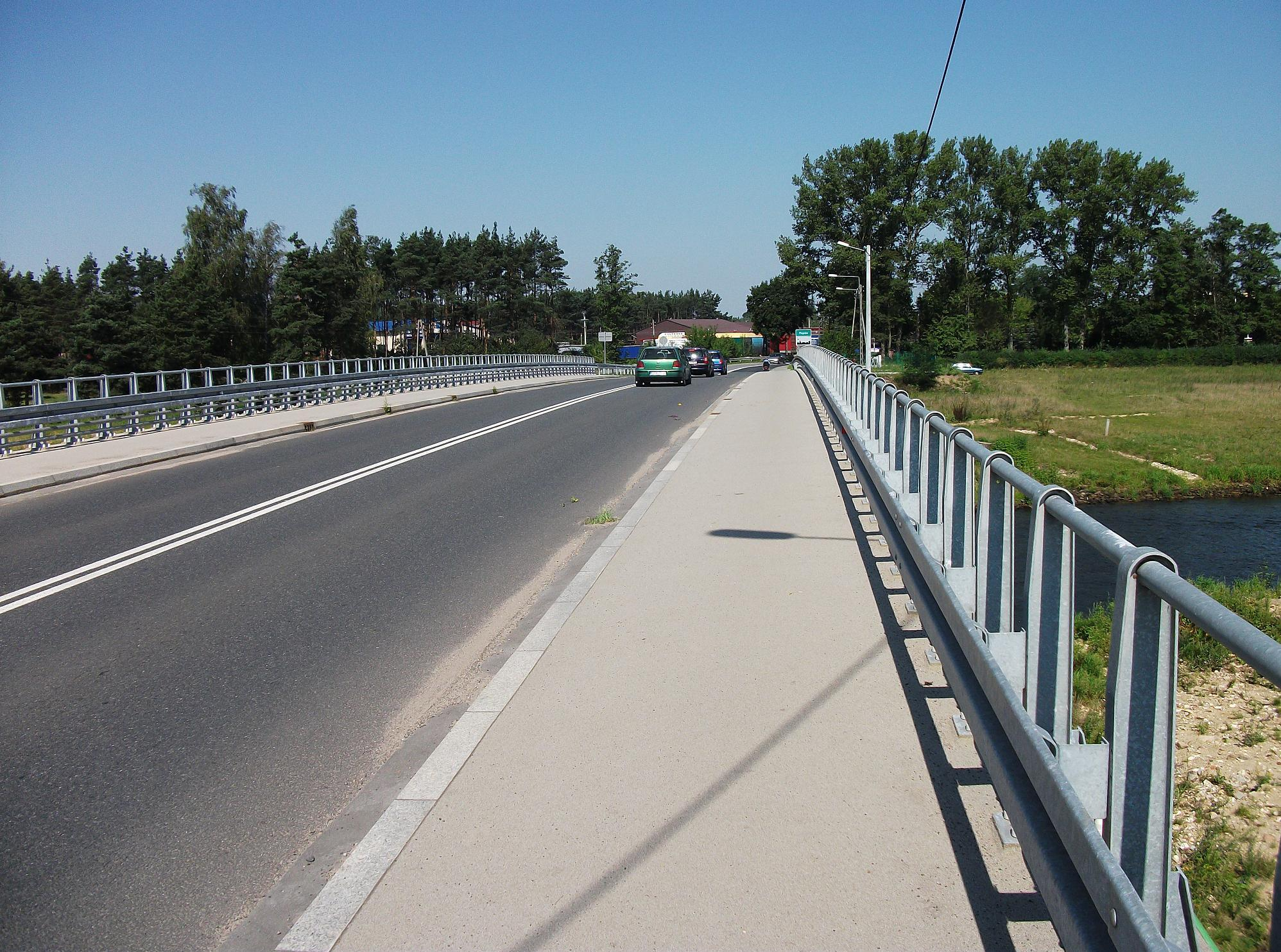 Most na Liswarcie w Zawadach (droga491)